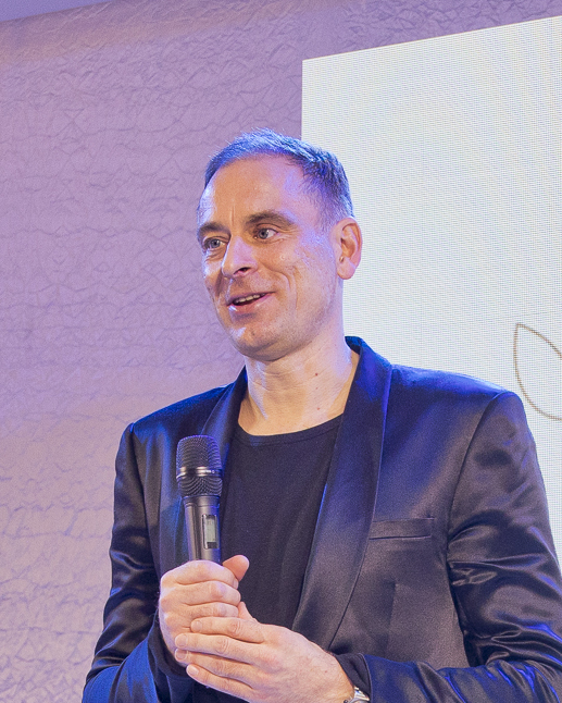 Rain Lõhmus, aasta kultuurisõber 2017